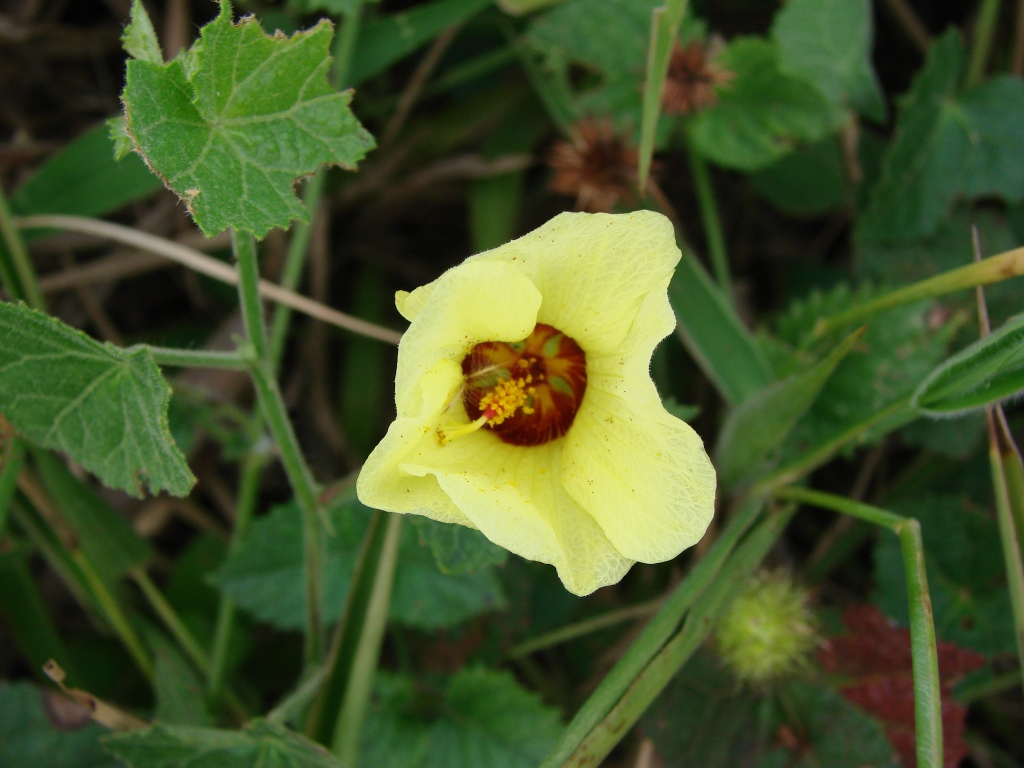 Pavonia cancellata (L.) Cav. - MALVACEAE - Cristópolis - Bahia - Brasil.